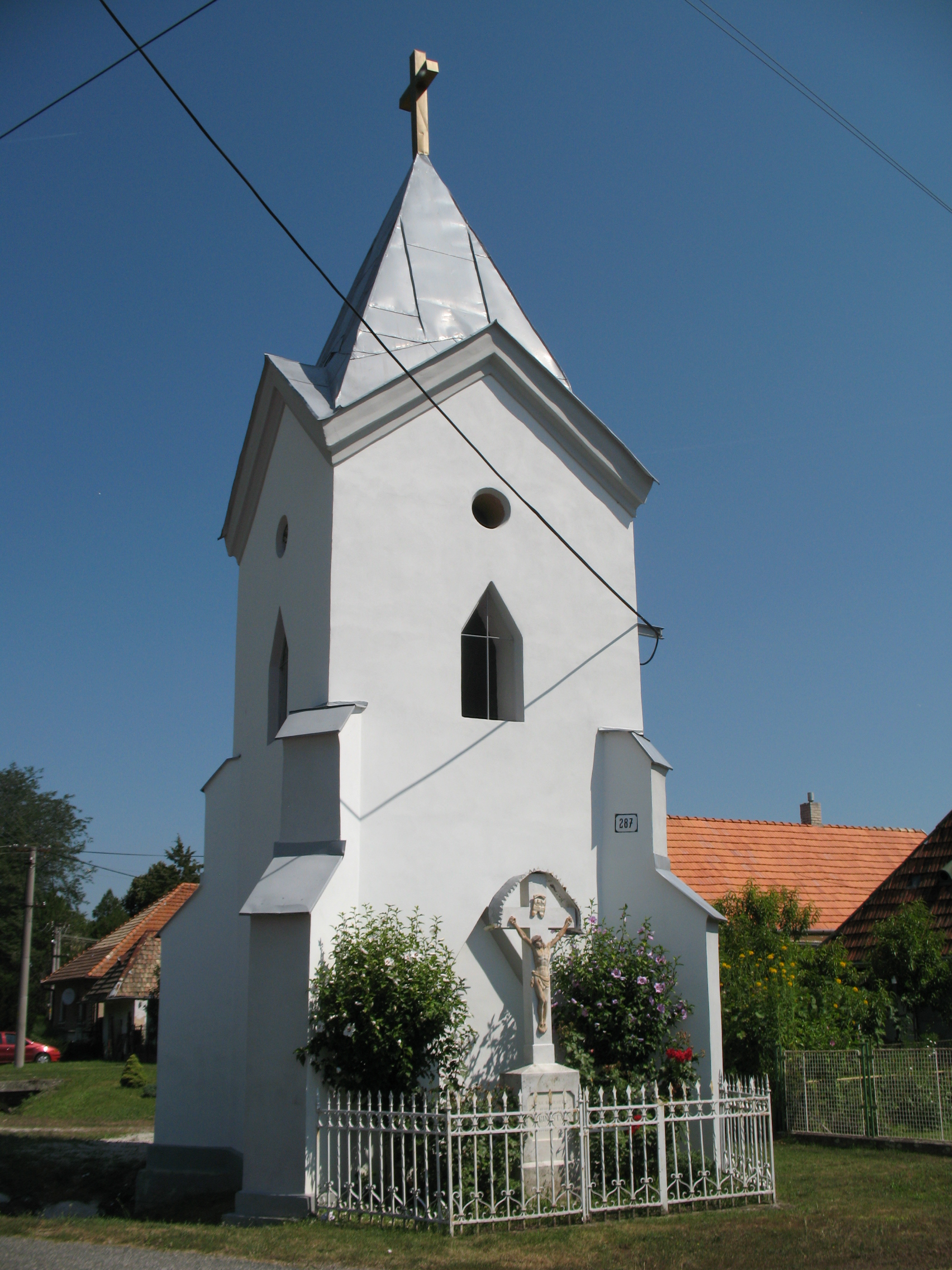 Felsőszemeréd